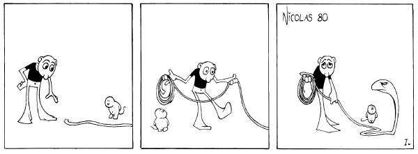 Nicolas Križan, den första publicerade "Lillen"-strippen (i Svenska Serier 1980). Medverkande är Ville, hans lille kompis Lillen samt namnlös orm.